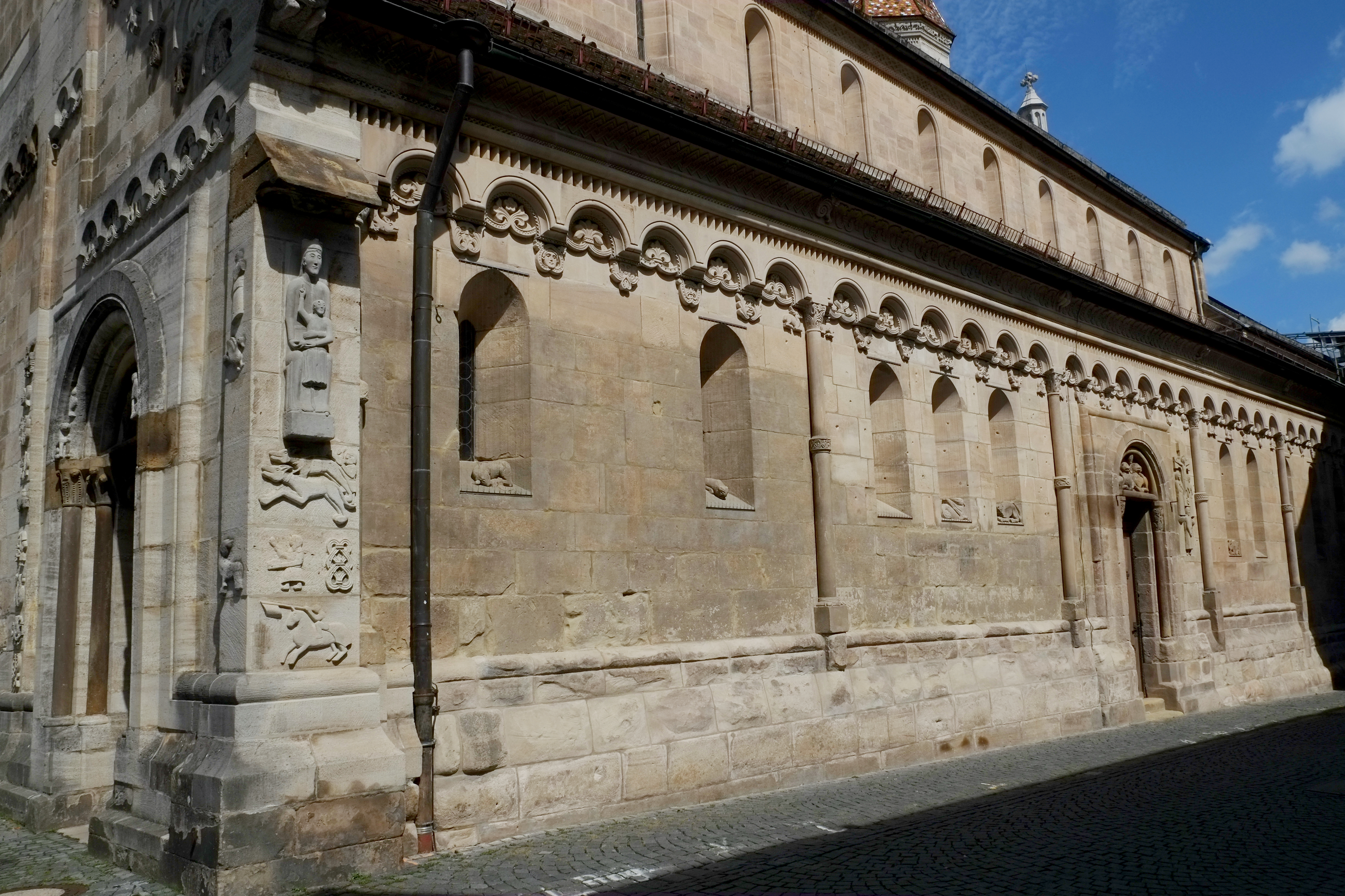 Johanniskirche in Schwäbisch Gmünd (Baden-Württemberg, Deutschland)